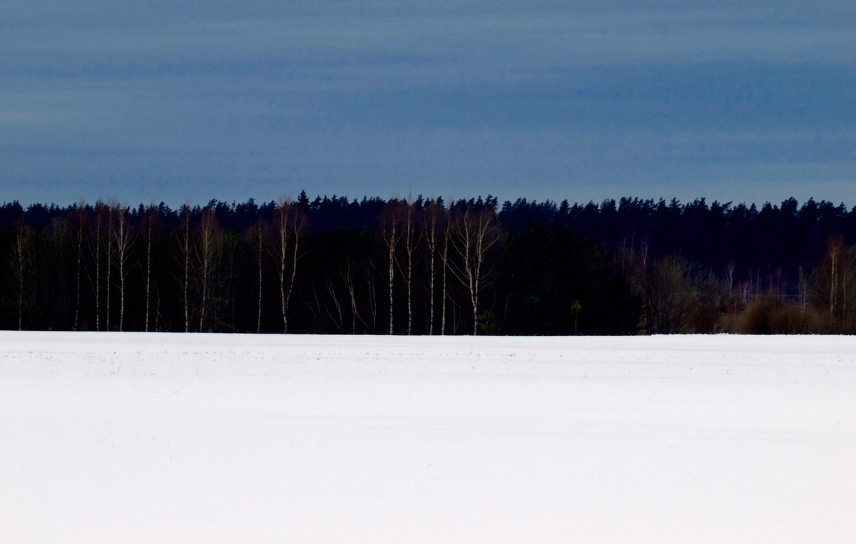 Selline näeb välja looduslik Eesti Vabariigi lipp.